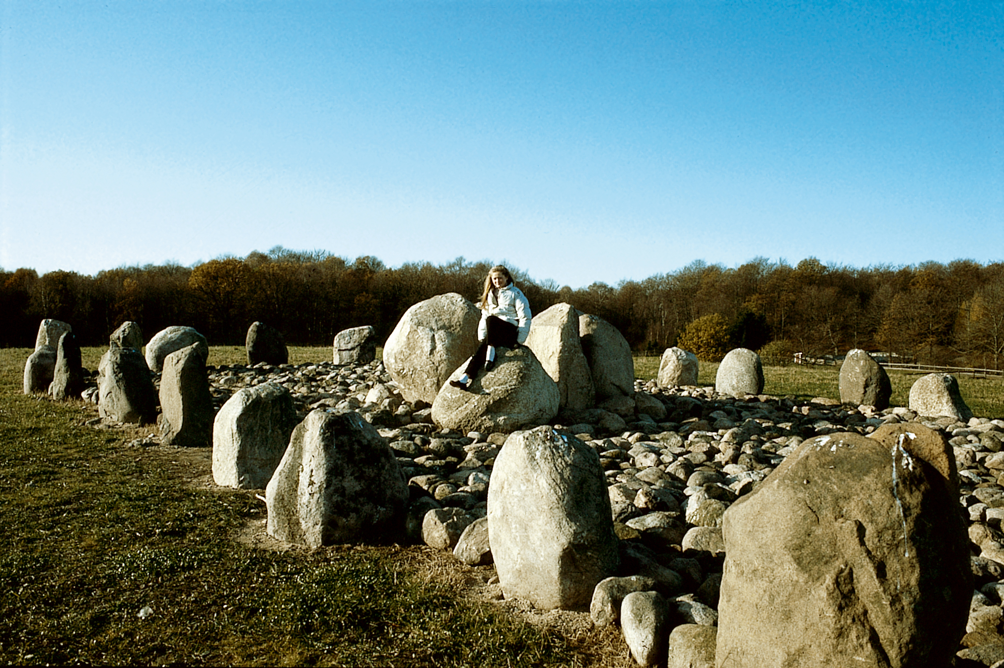 Stenåldersprojektet Forntid i Nutid i Skånes djurpark, Sverige